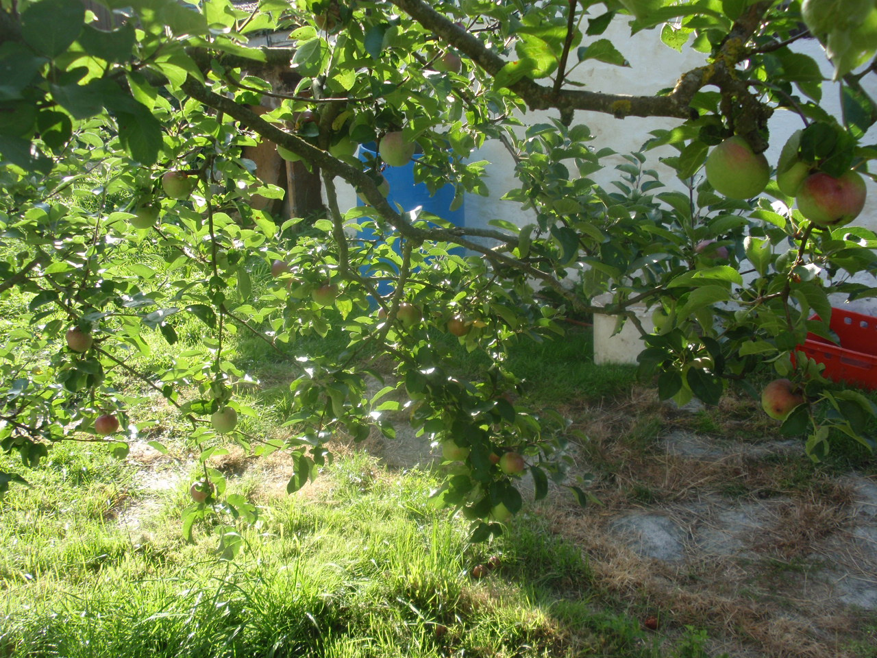 Jabloň větev